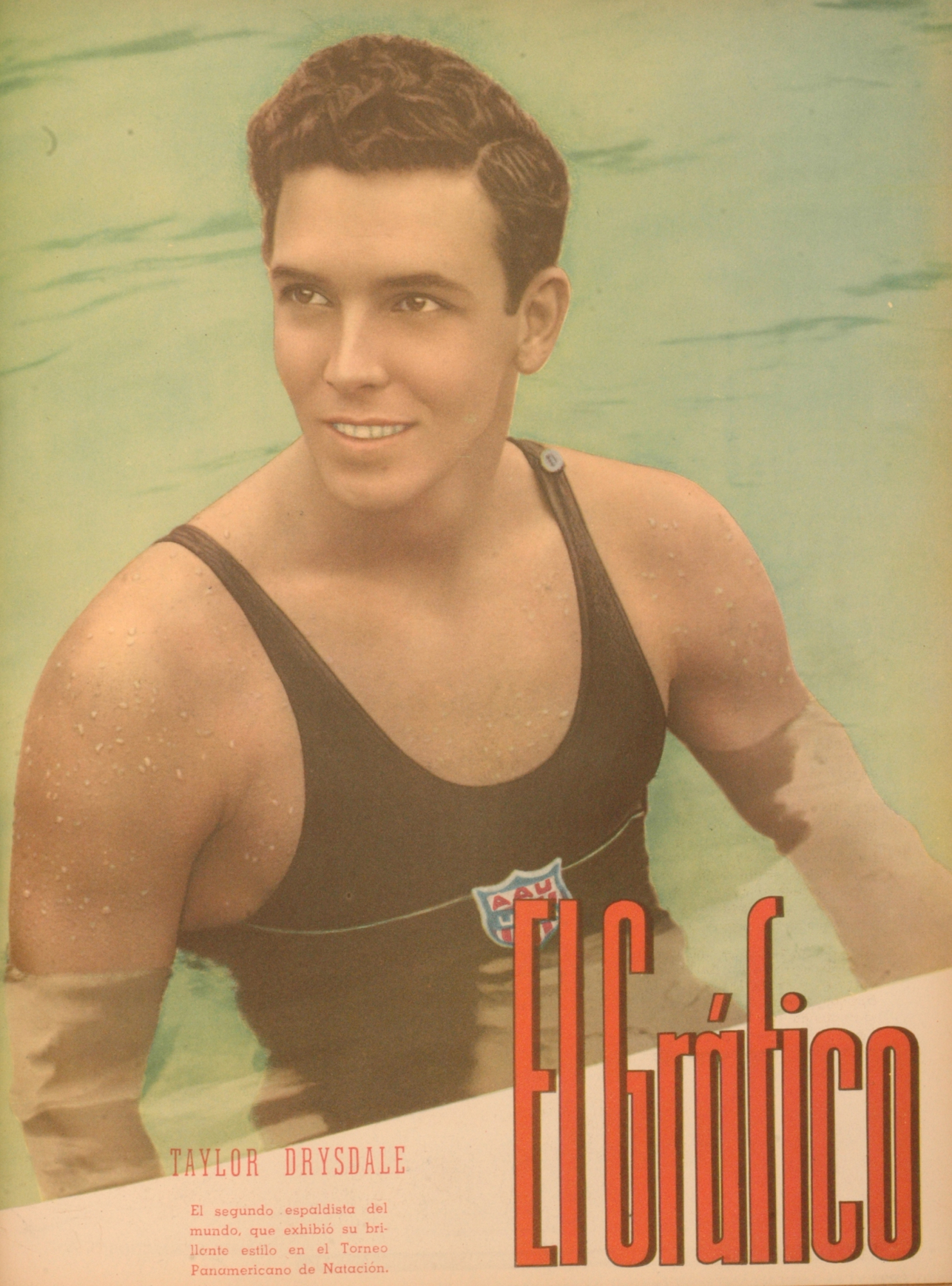 El Grafico del 16 de Febrero de 1940. Edicion 1075